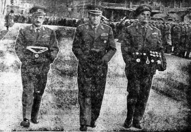 Franc Poglajen, Janko Sekirnik in Dušan Švara na pogrebu Dušana Kvedra.